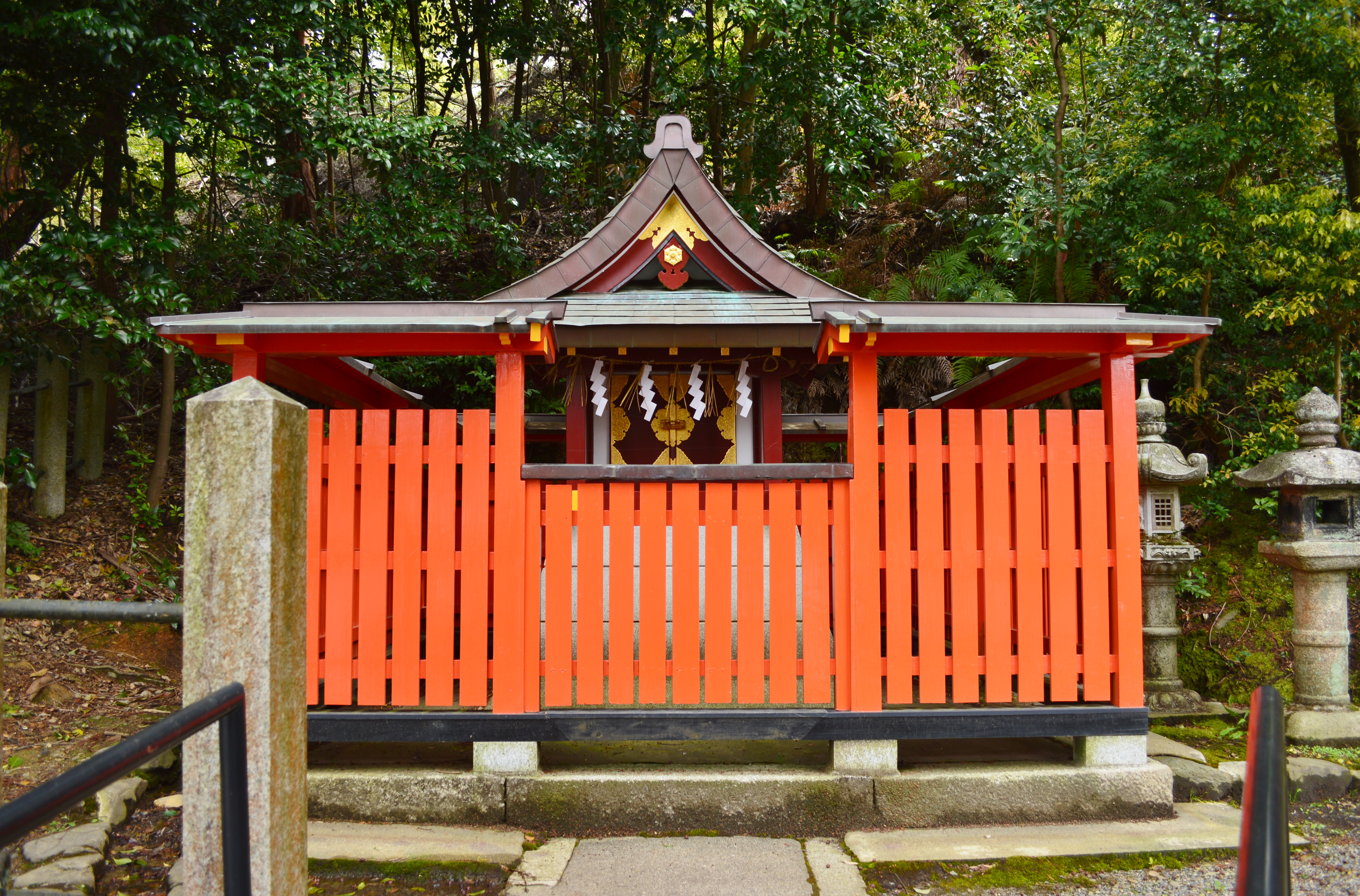 吉田神社 (京都市) 境内神楽岡社 Nikon D3200